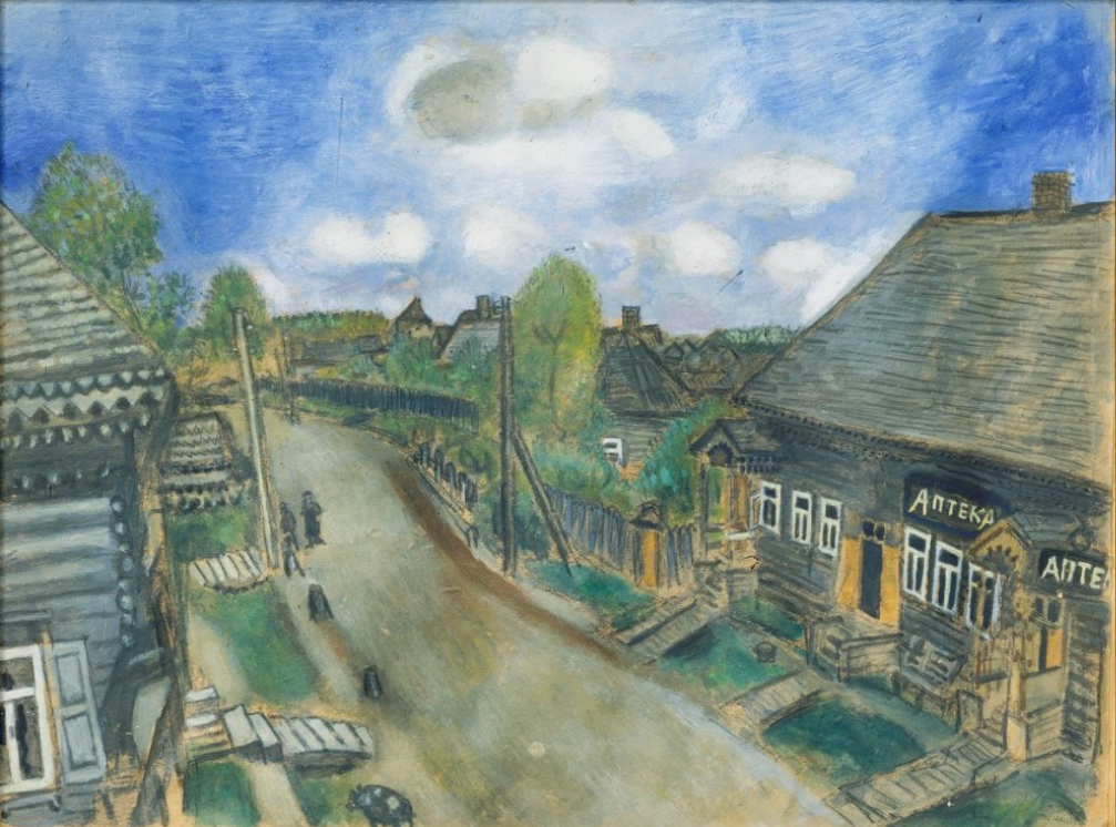 Беларуская (тарашкевіца): Лёзна (Lozna), вуліца Папоўская (vulica Papoŭskaja). Аптэка